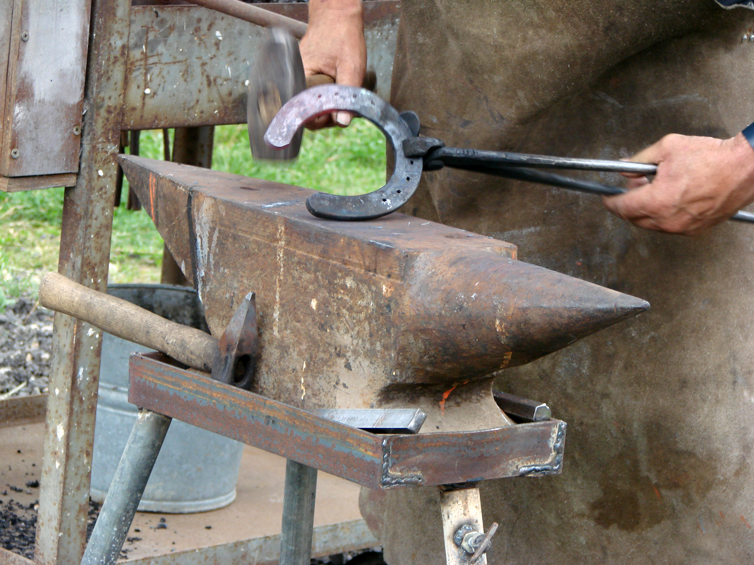 Modelage du fer selon la forme particulière de ce sabot.